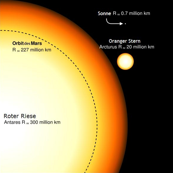 Größenvergleich Roter Riese Antares, Sonne und Arcturus